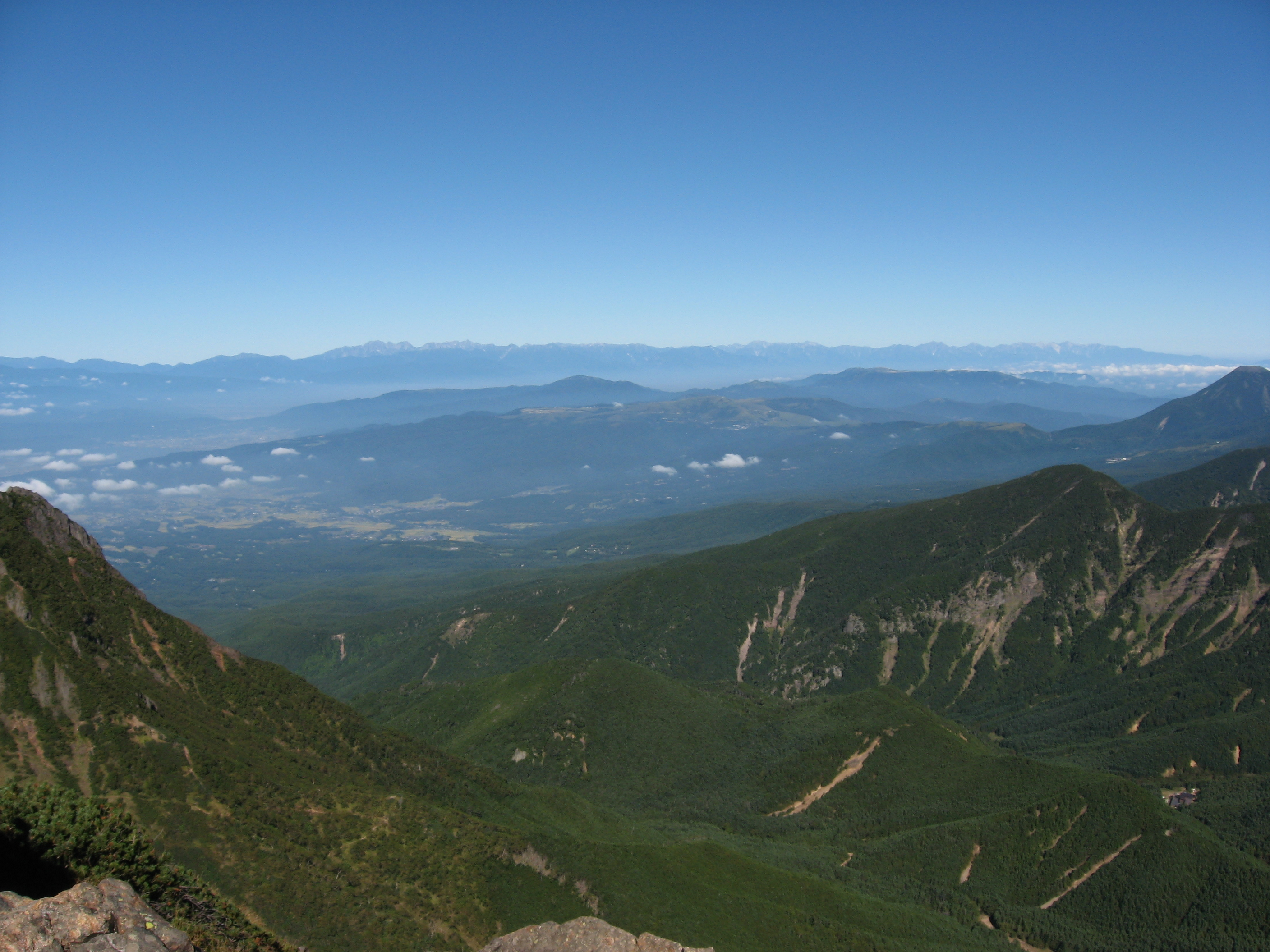 八ヶ岳より望む本州中部山岳地帯